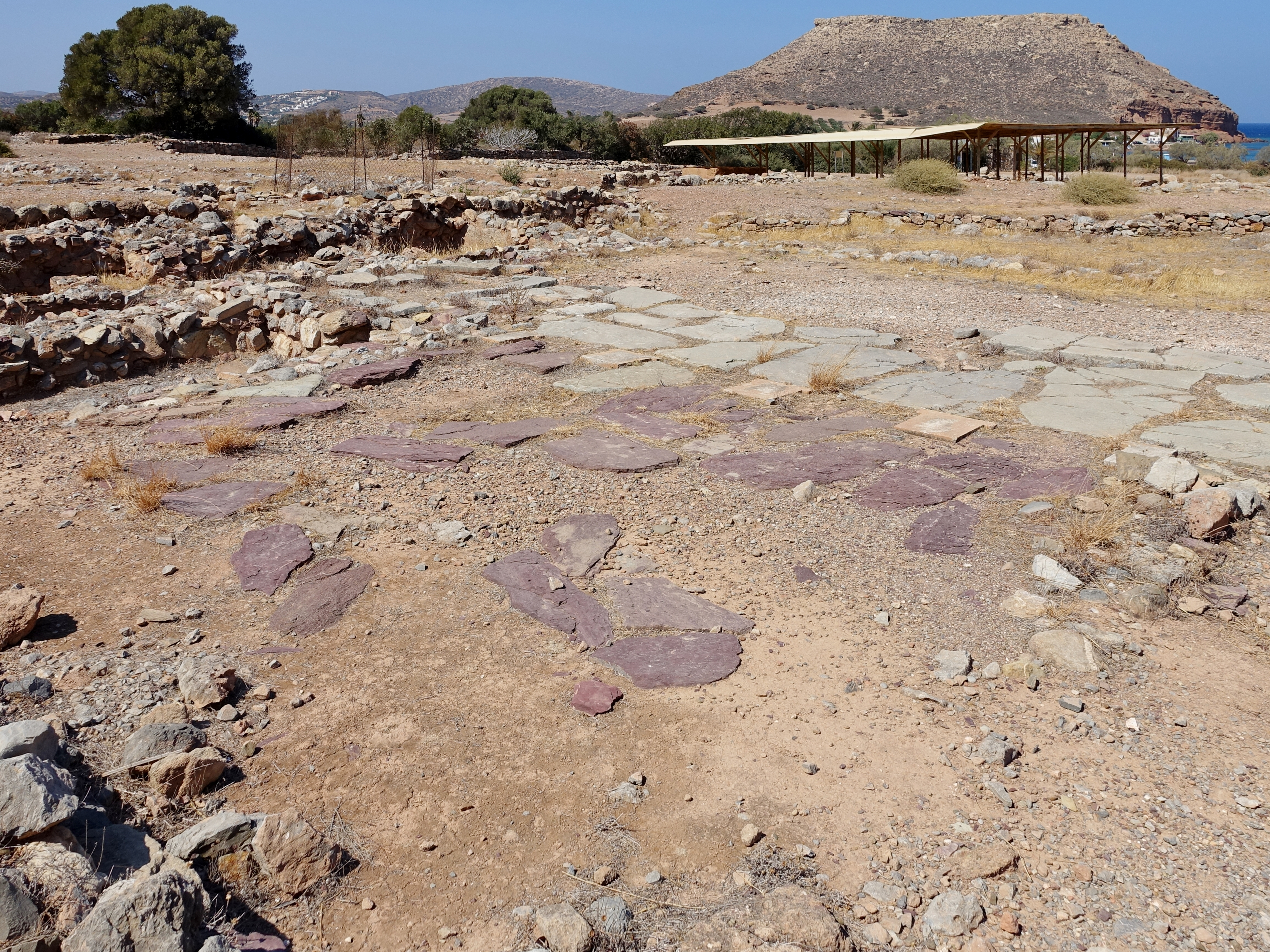 Ausgrabungsstätte von Roussolakkos (Ρουσσόλακκος) nahe Palekasto, Gemeinde Sitia, Kreta, Griechenland